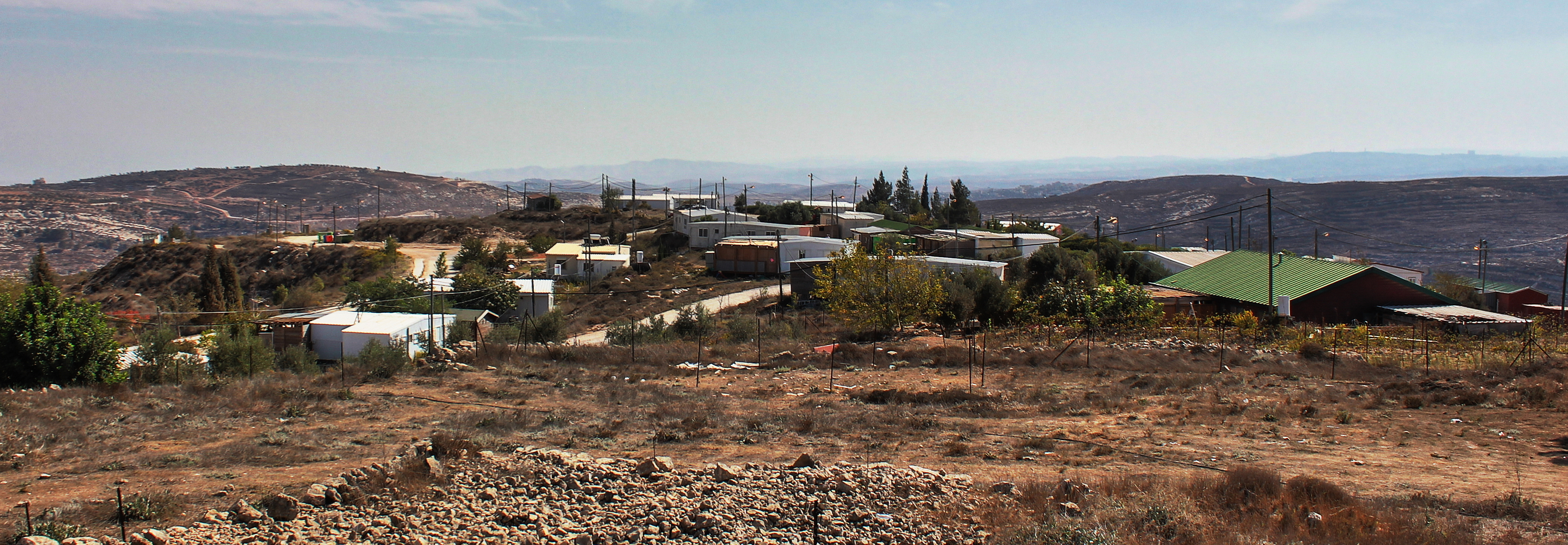 Amona